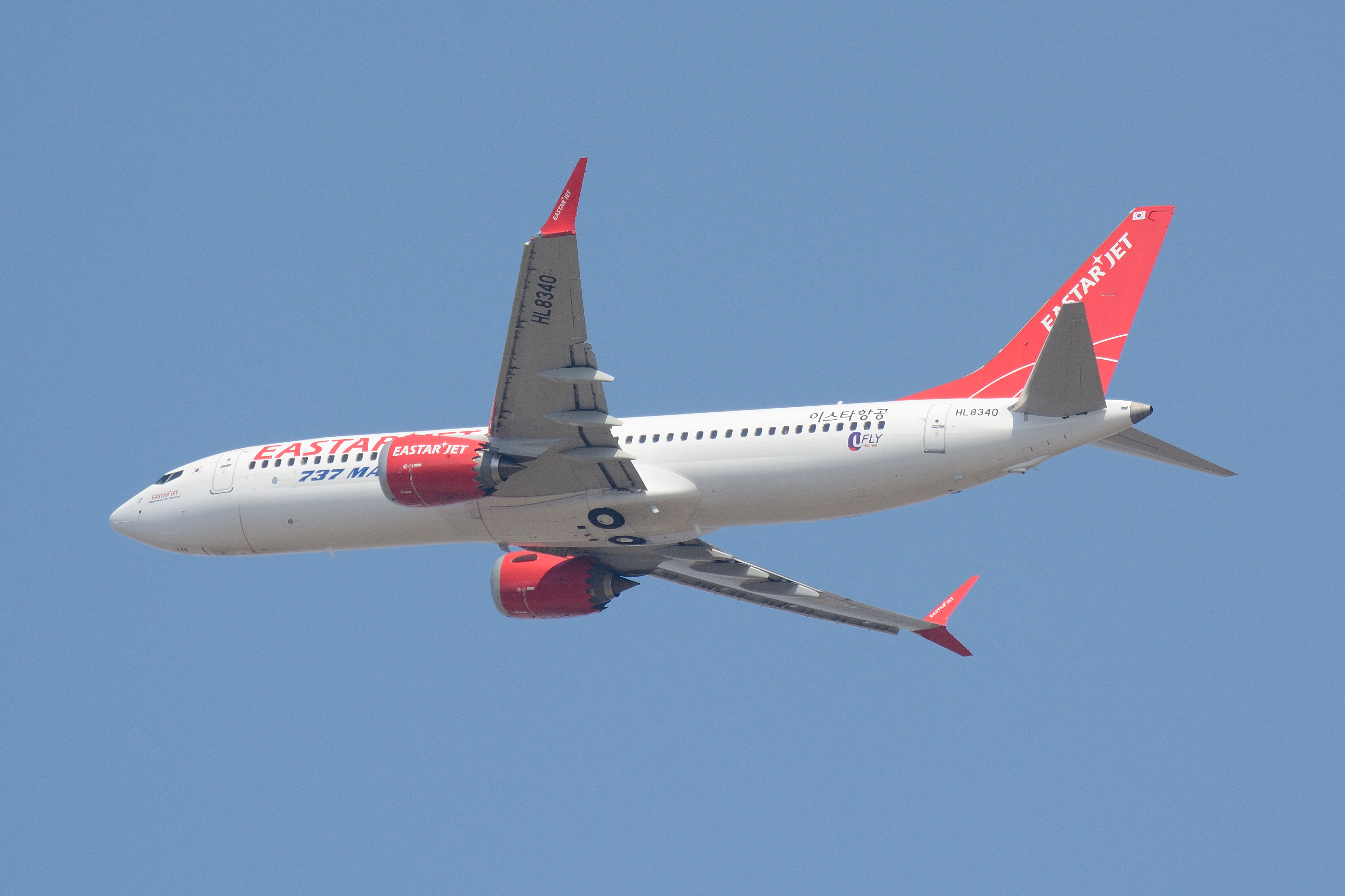 Eastar Jet, Boeing 737 max8, HL8340, NRT Nikon D7100